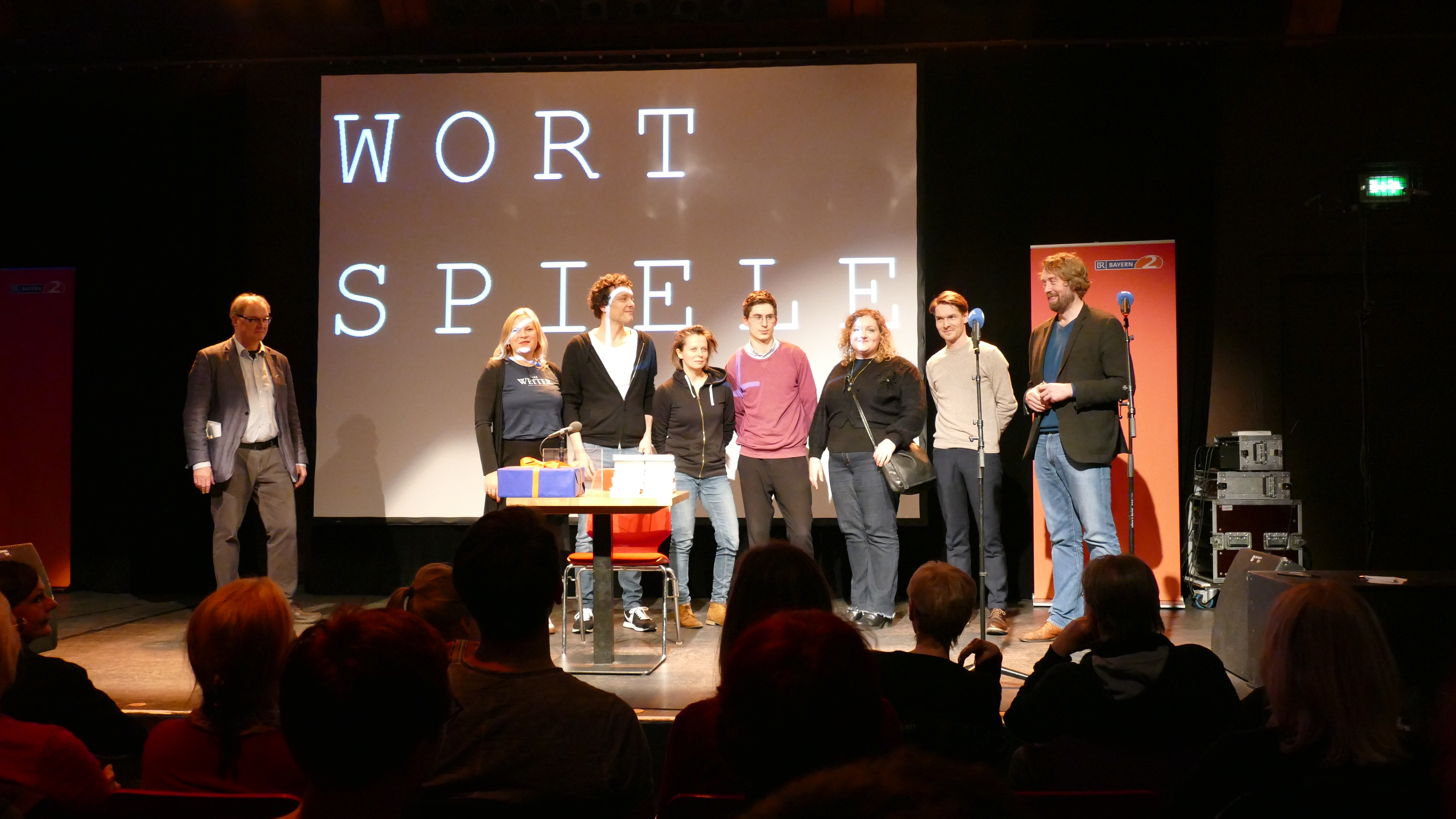 von inks: Johan de Blank,Elisabeth R. Hager, Thomas Klupp, Ally Klein, Juan S. Guse, Luba Goldberg-Kuznetsova, Anselm Oelze, Knut Cordsen